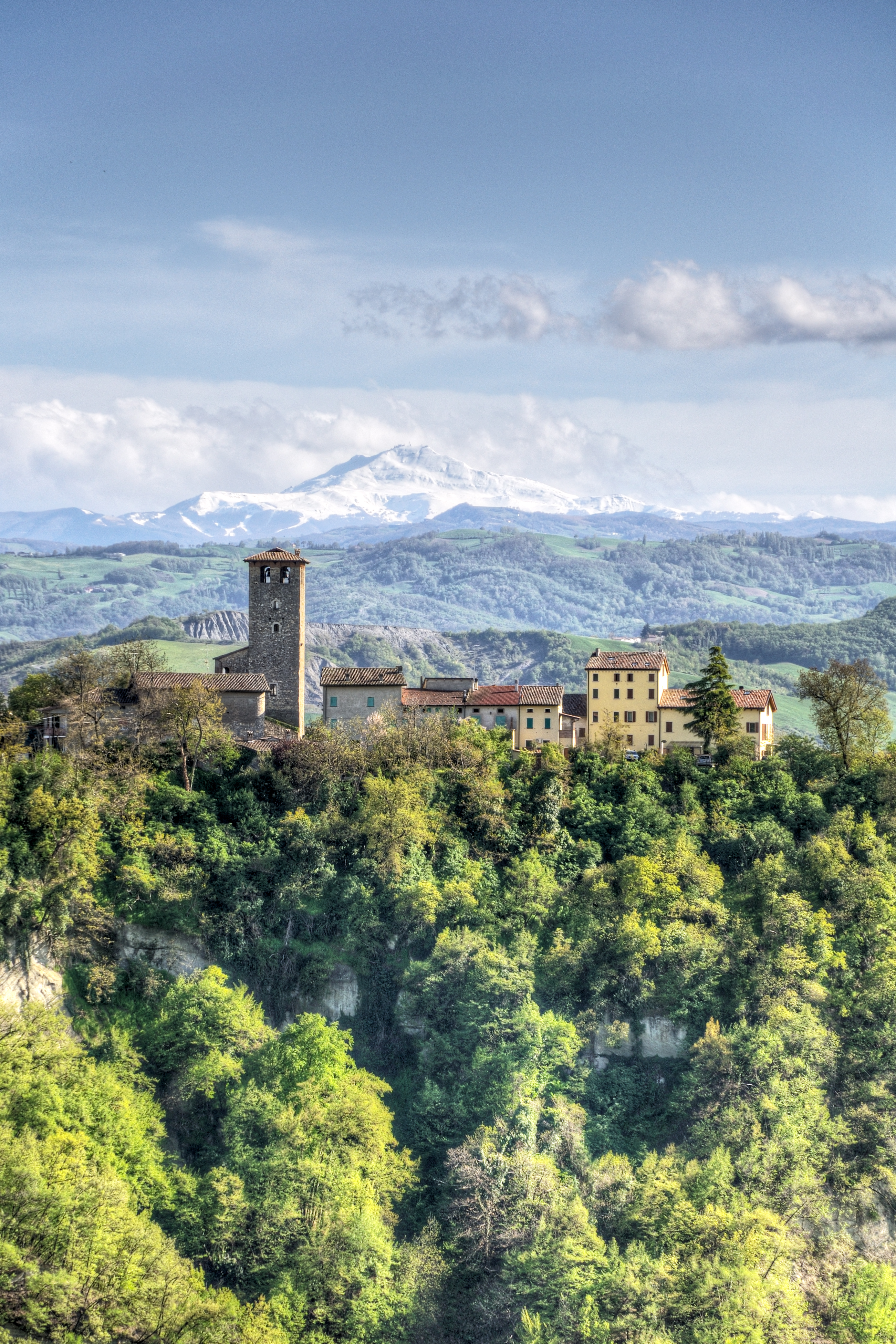 Scorcio di Montebabbio, frazione del comune di Castellarano, in Provincia di Reggio Emilia, con il Monte Cimone sullo sfondo.